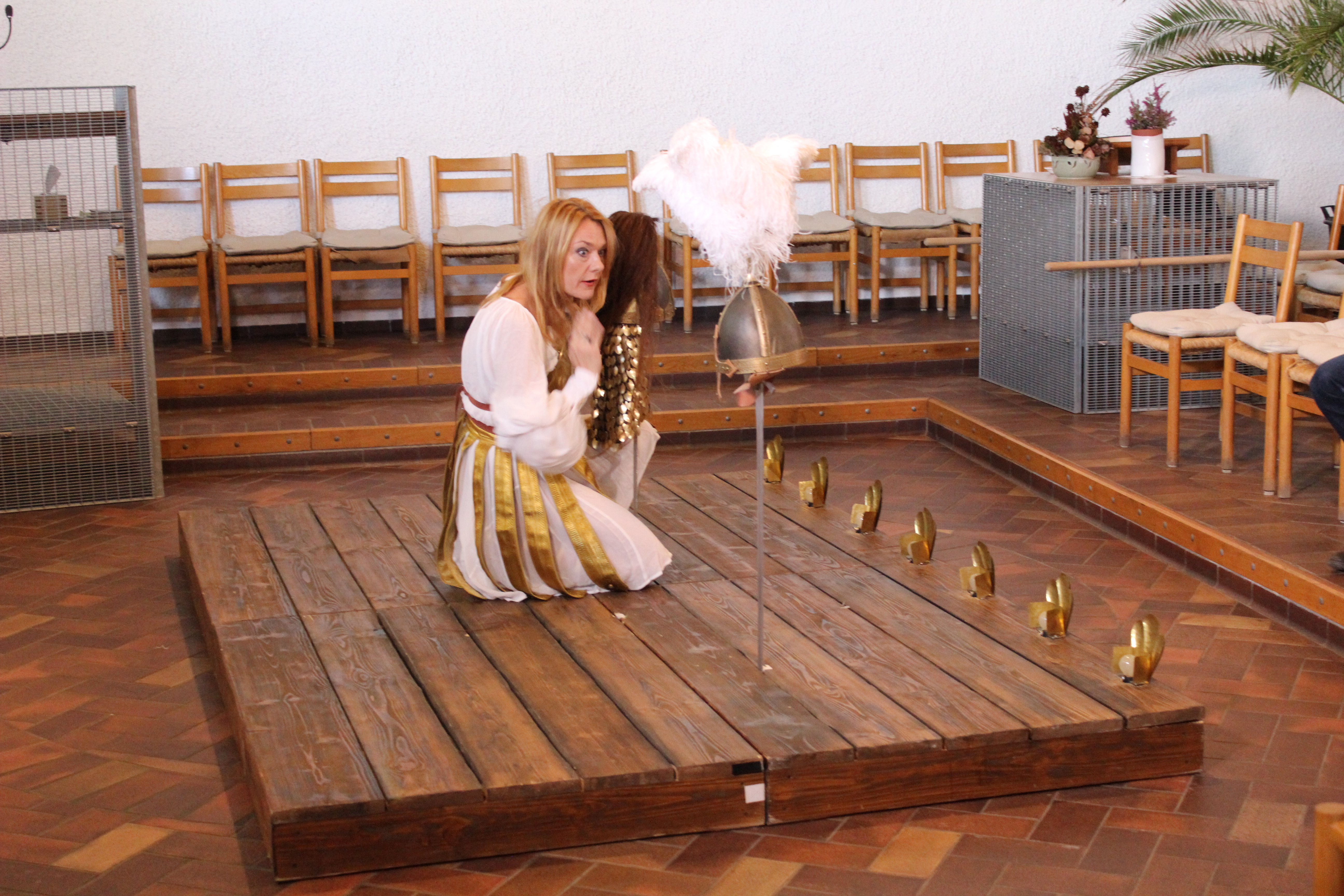 Nácvik vystoupení české pěvkyně Magdaleny Kožené v kostele U Jákobova žebříku.